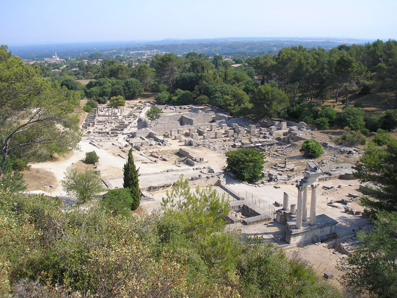 Site de Glanum_Nord_2006-07-16.jpg Les conditions de mise en valeur du site, de réalisation d’un anastylose et d’un bâtiment d’accueil bien intégré au site répondent aujourd'hui aux attentes du public